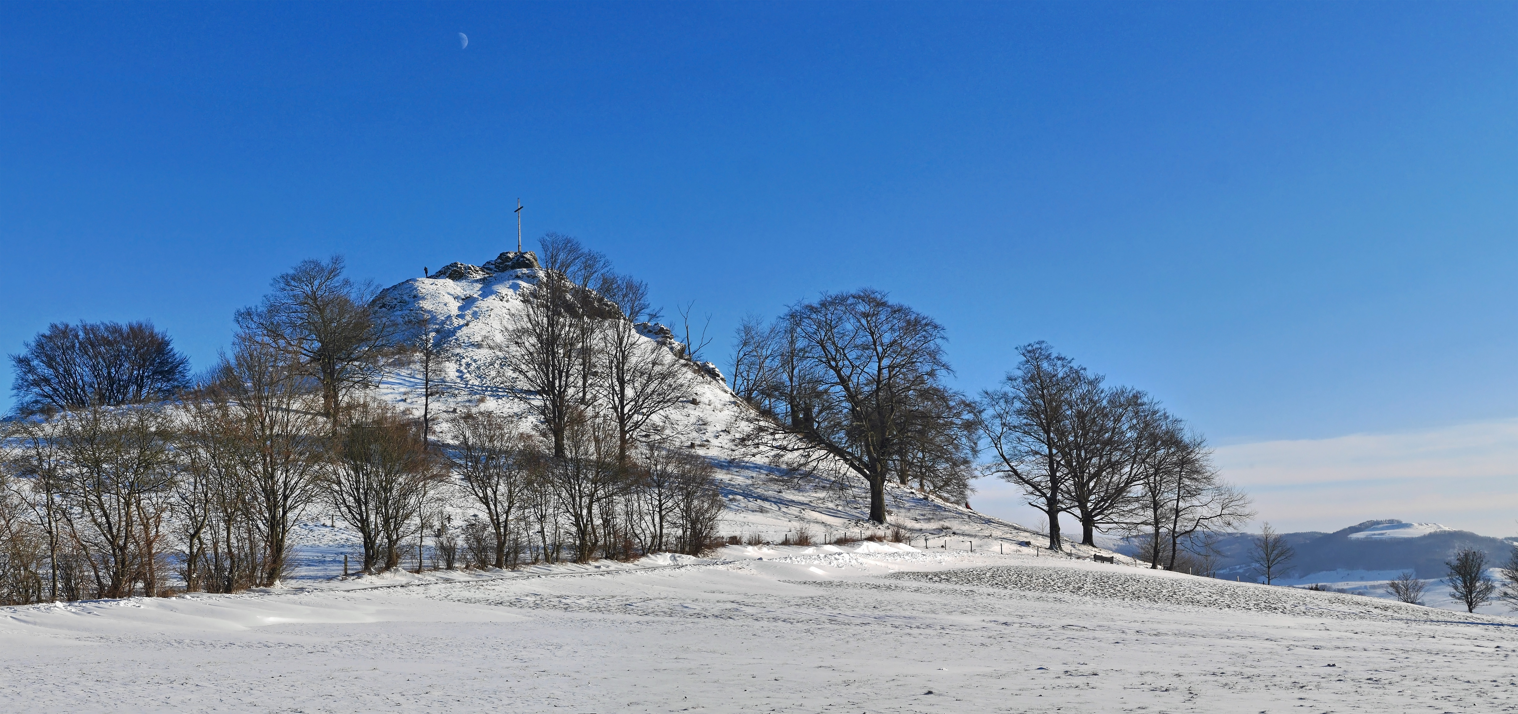 Der Wachtküppel ist ein 705 m hoher Berg in der Rhön. Gersfeld liegt etwa 3 km südöstlich vom Wachtküppel. Im Hintergrund rechts sieht man den 843 m hohen Simmelsberg. Diese Datei wurde mit Hugin erstellt